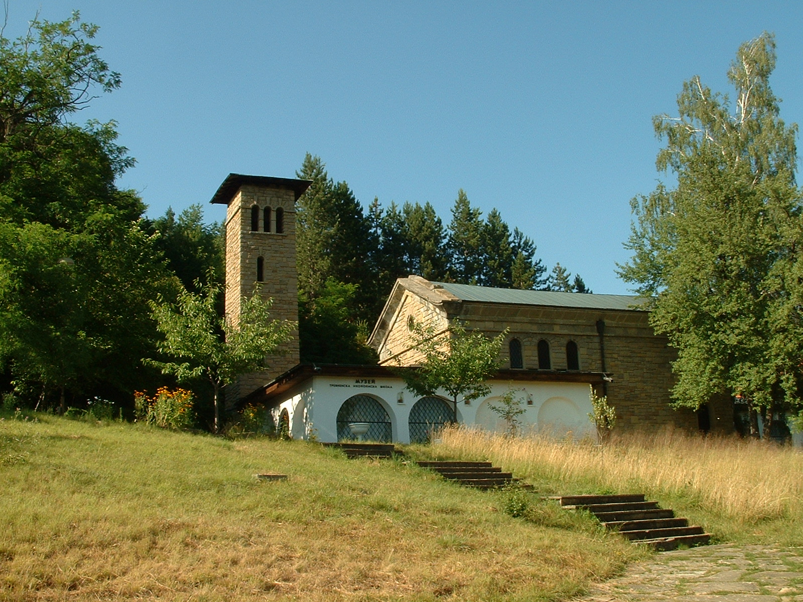 Поглед към музея на иконата, Трявна.